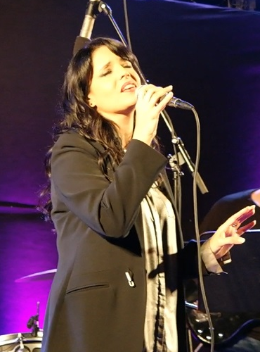 דפנה דקל